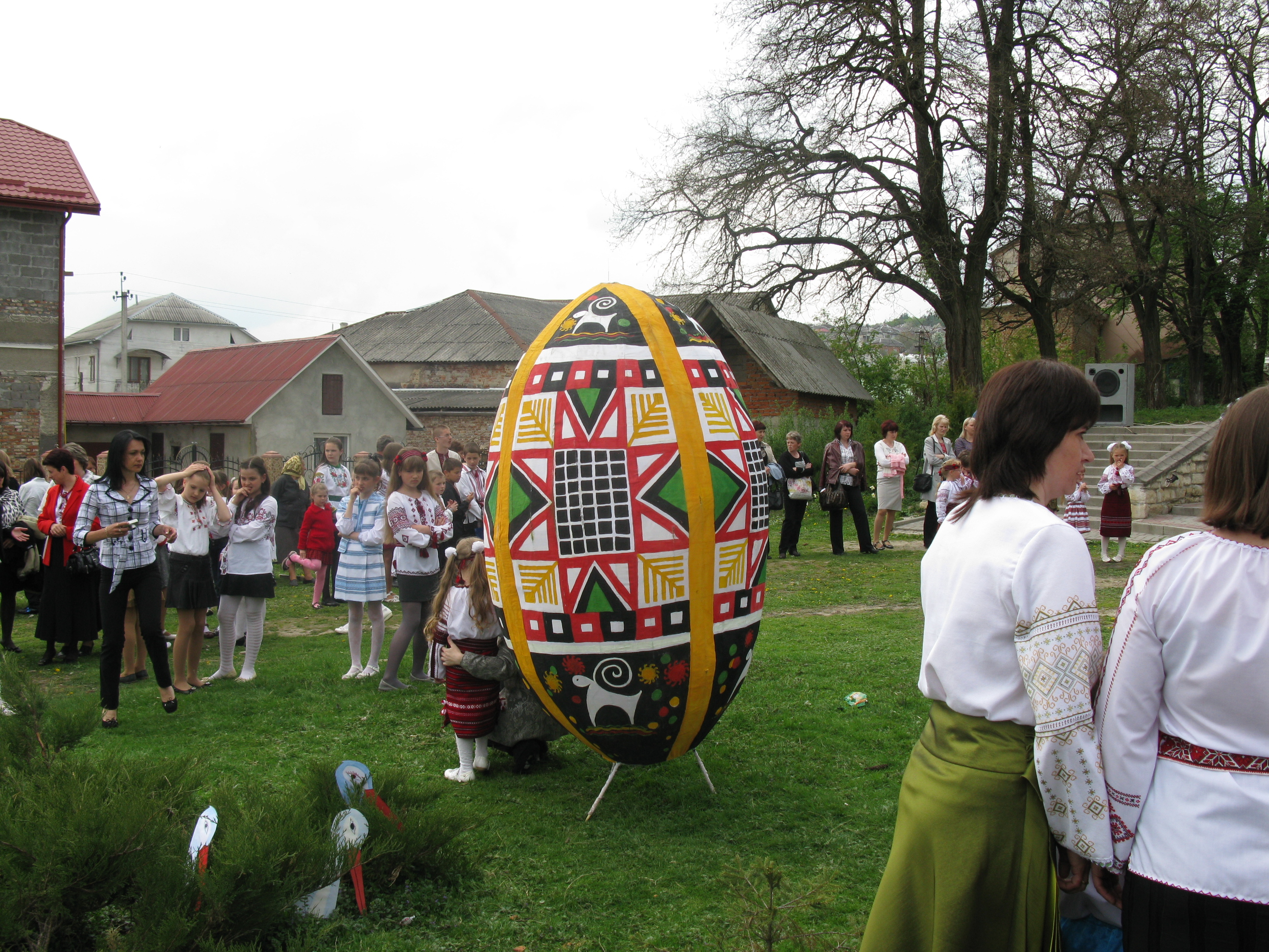 свято гаївок в парку ім. Богдана Хмельницького 2011р